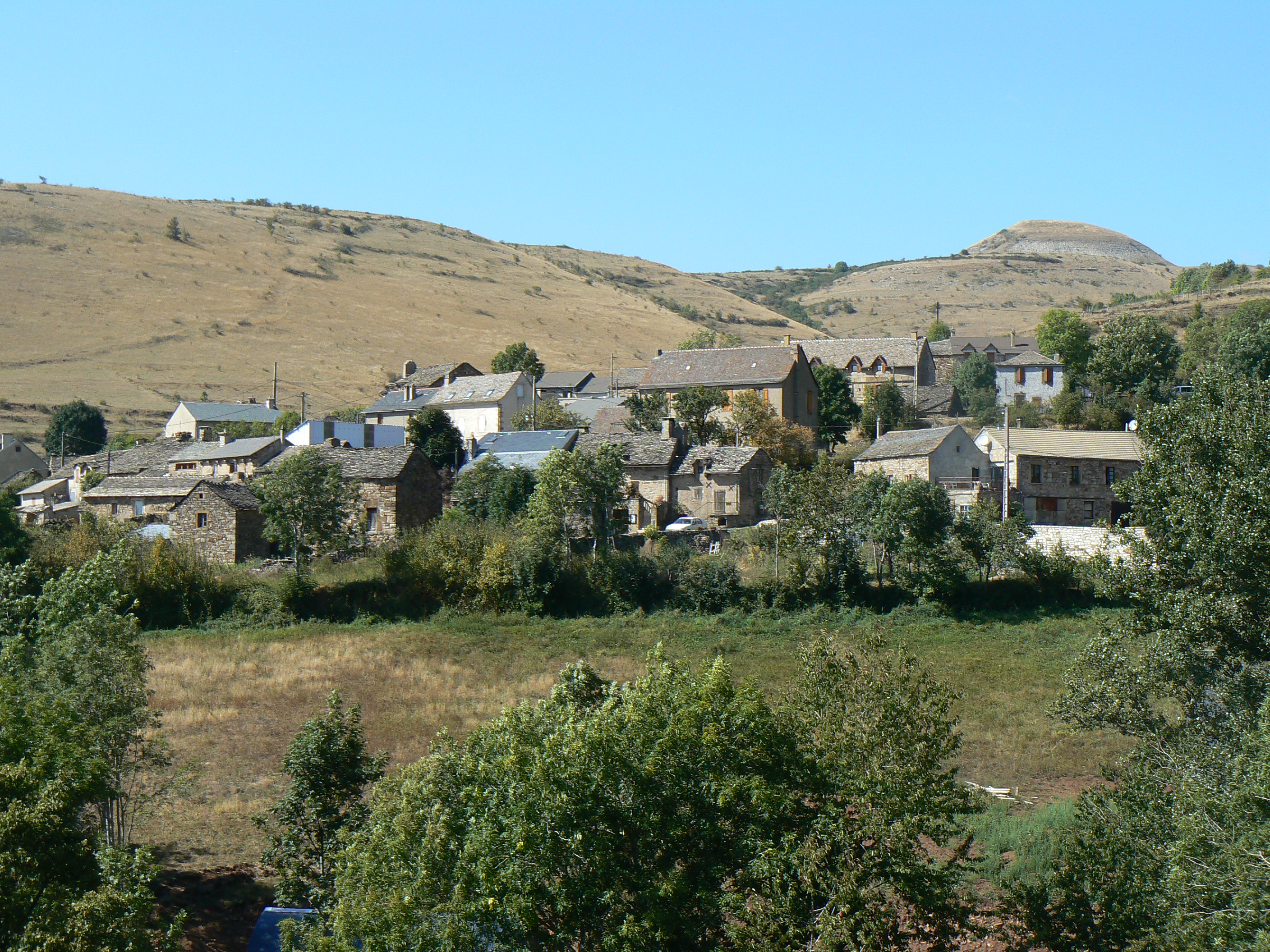 Vue générale de la commune des Bondons (Lozère)